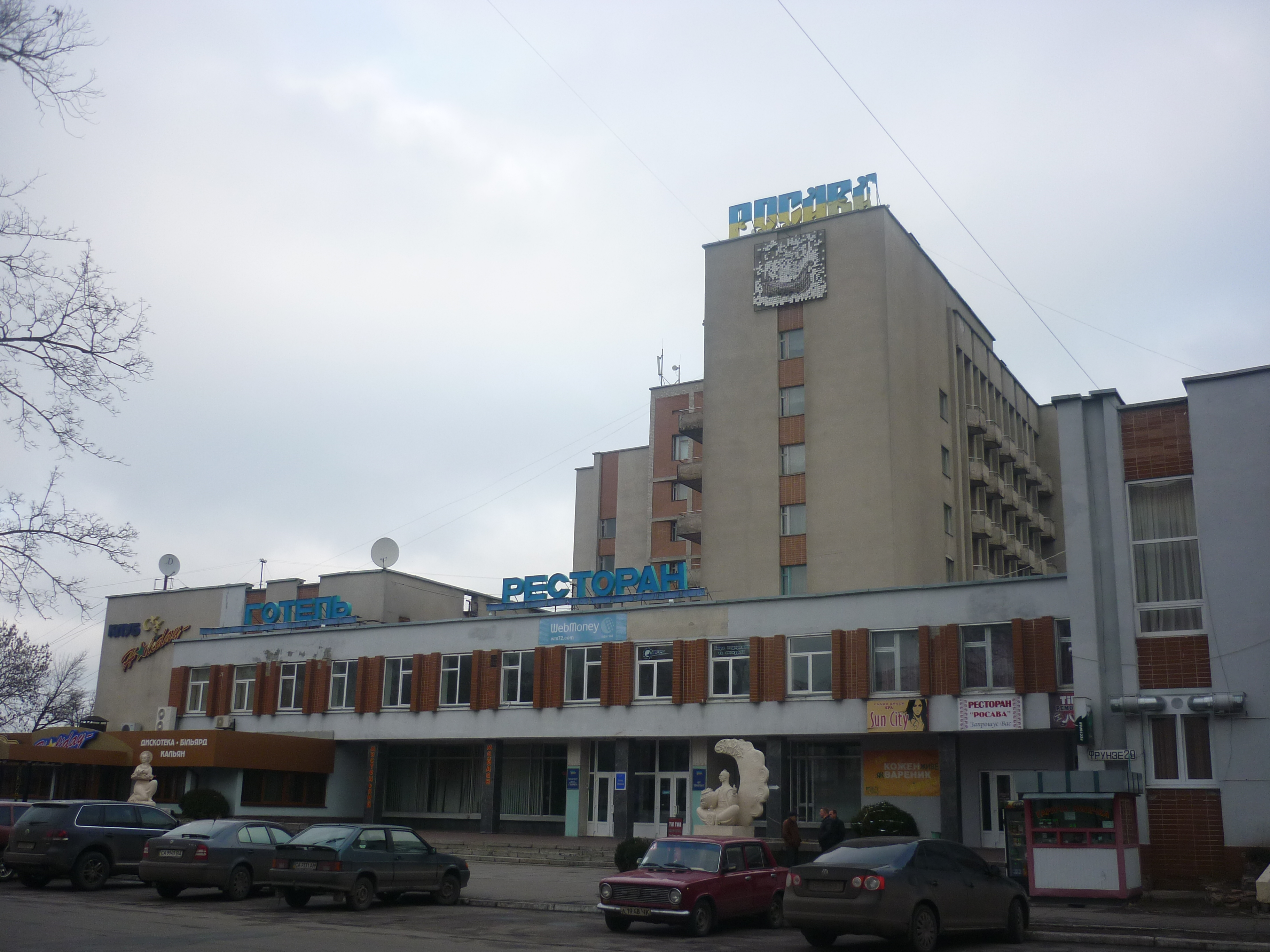 Готель "Росава" в Черкасах